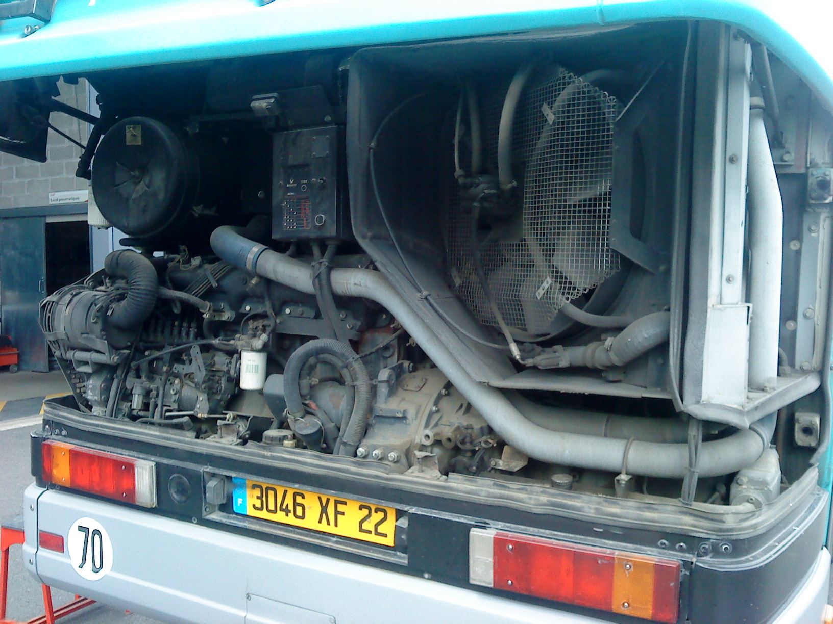 Renault Agora S n°401 TUB - Moteur